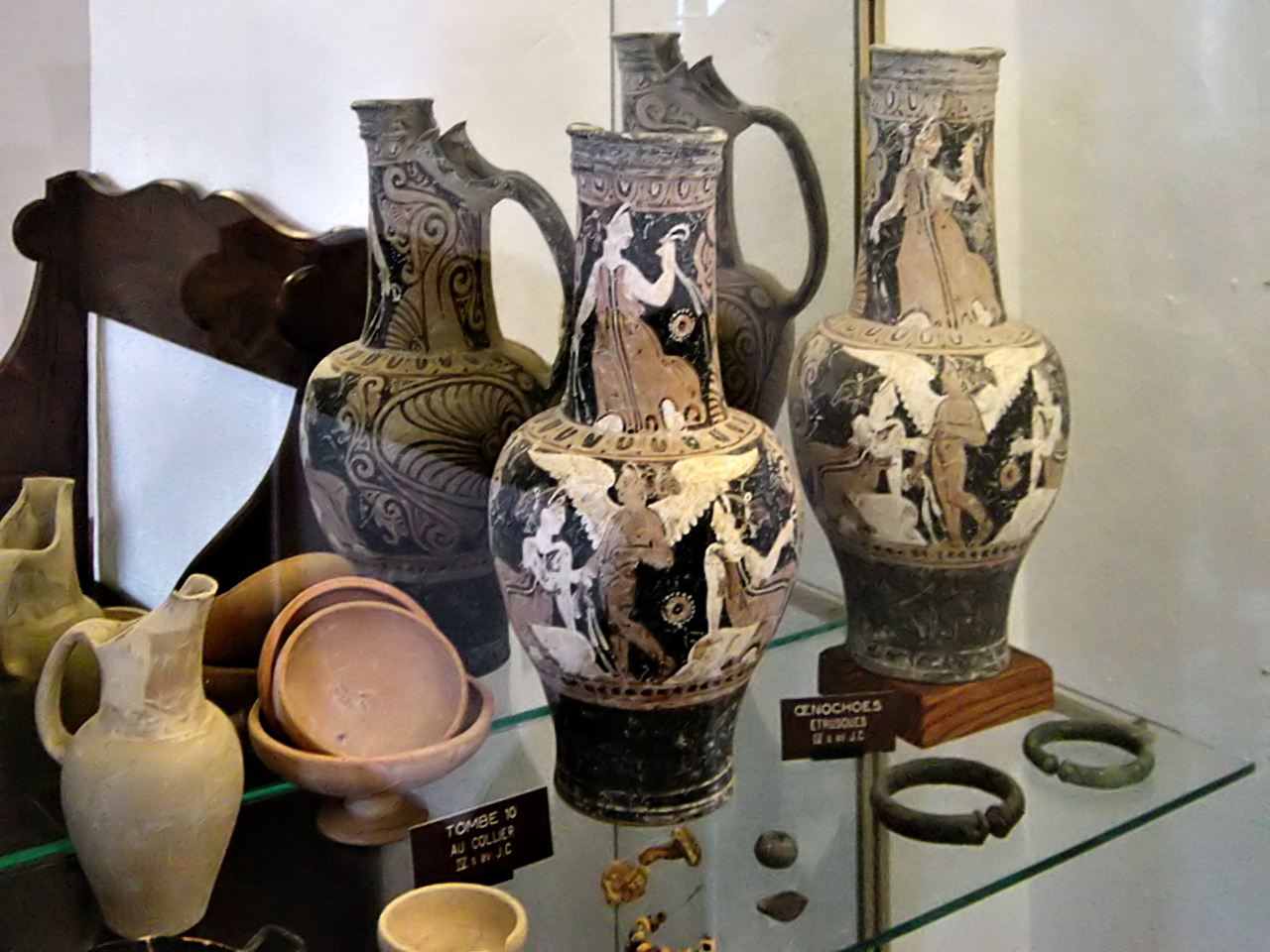 Aléria (Corsica) - Pièce exposée au musée départemental d'archéologie Jérôme Carcopino au fort de Matra